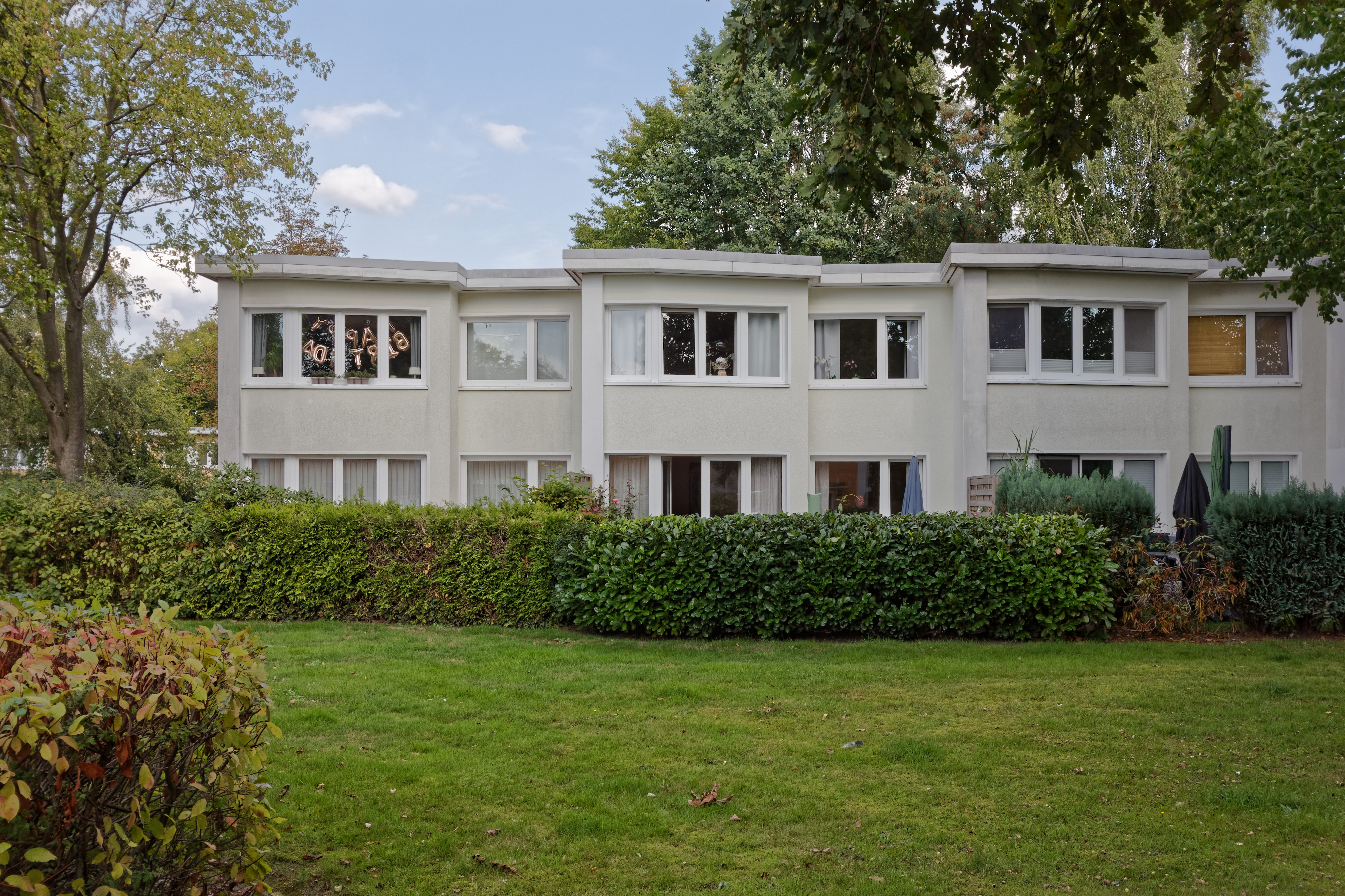 Hamburg-Bramfeld, Gartenstadt Hohnerkamp, Häuserzeile Hohnerkamp 120This is a photograph of an architectural monument.